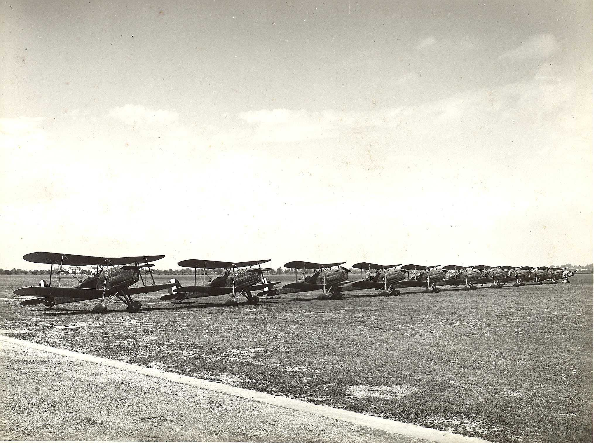 Aeronatica Caproni di Predappio - aerei Ca.164